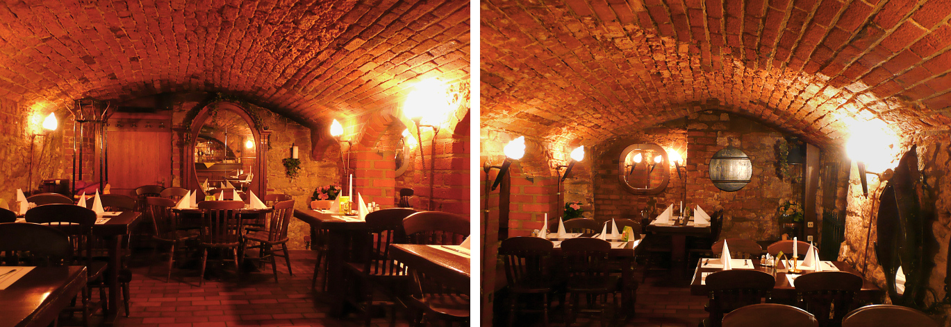 Gewölbekeller Broyanhaus